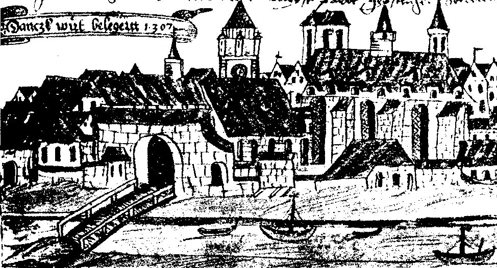 Brama Kogi w Gdańsku według rysunku z Kroniki Redana z 1553 roku.